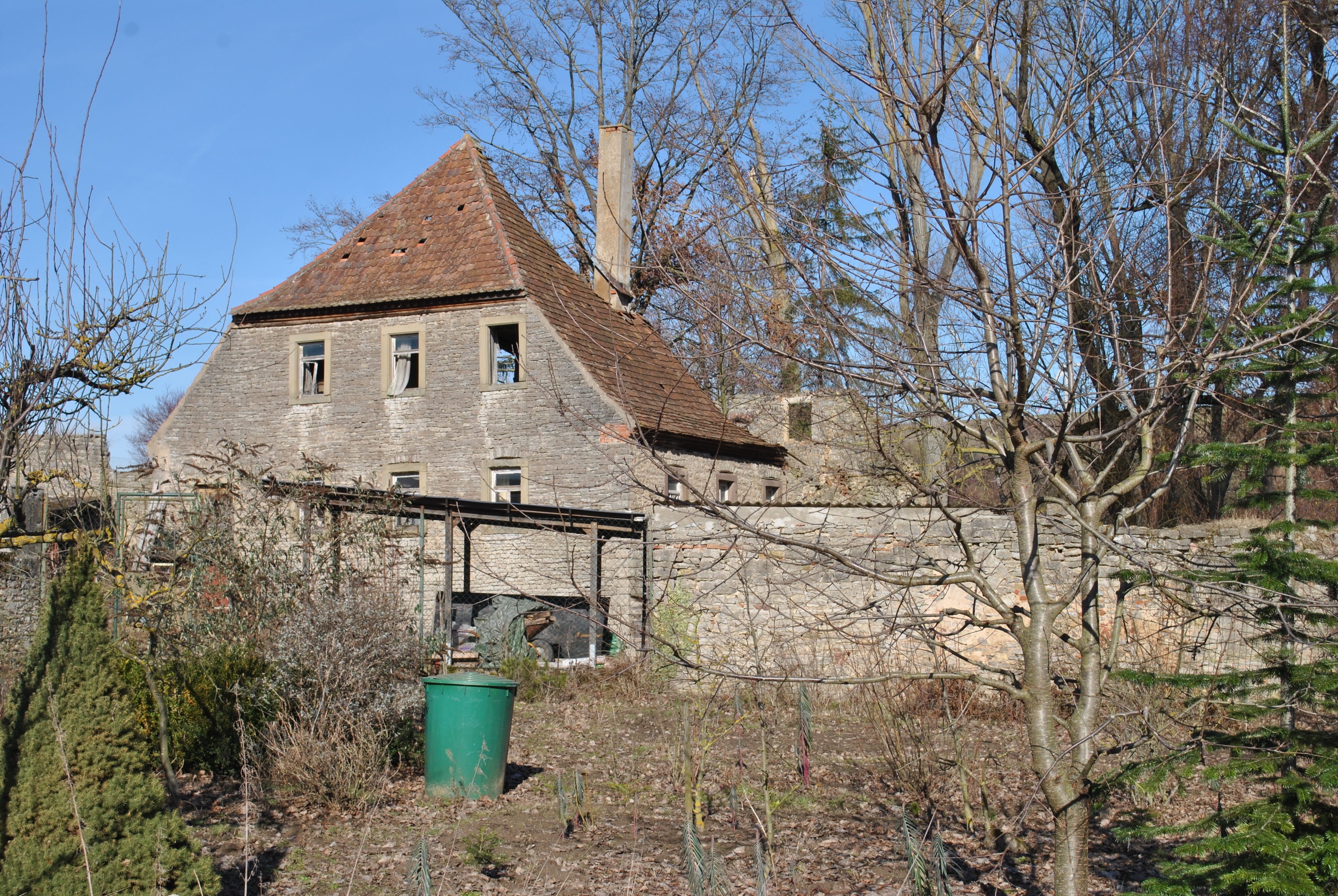 Küffleinsmühle, Dettelbach am Dettelbach, Ersterwähnung 1567, Namen: „Küffleinsmühle“, Aufgabe 1927